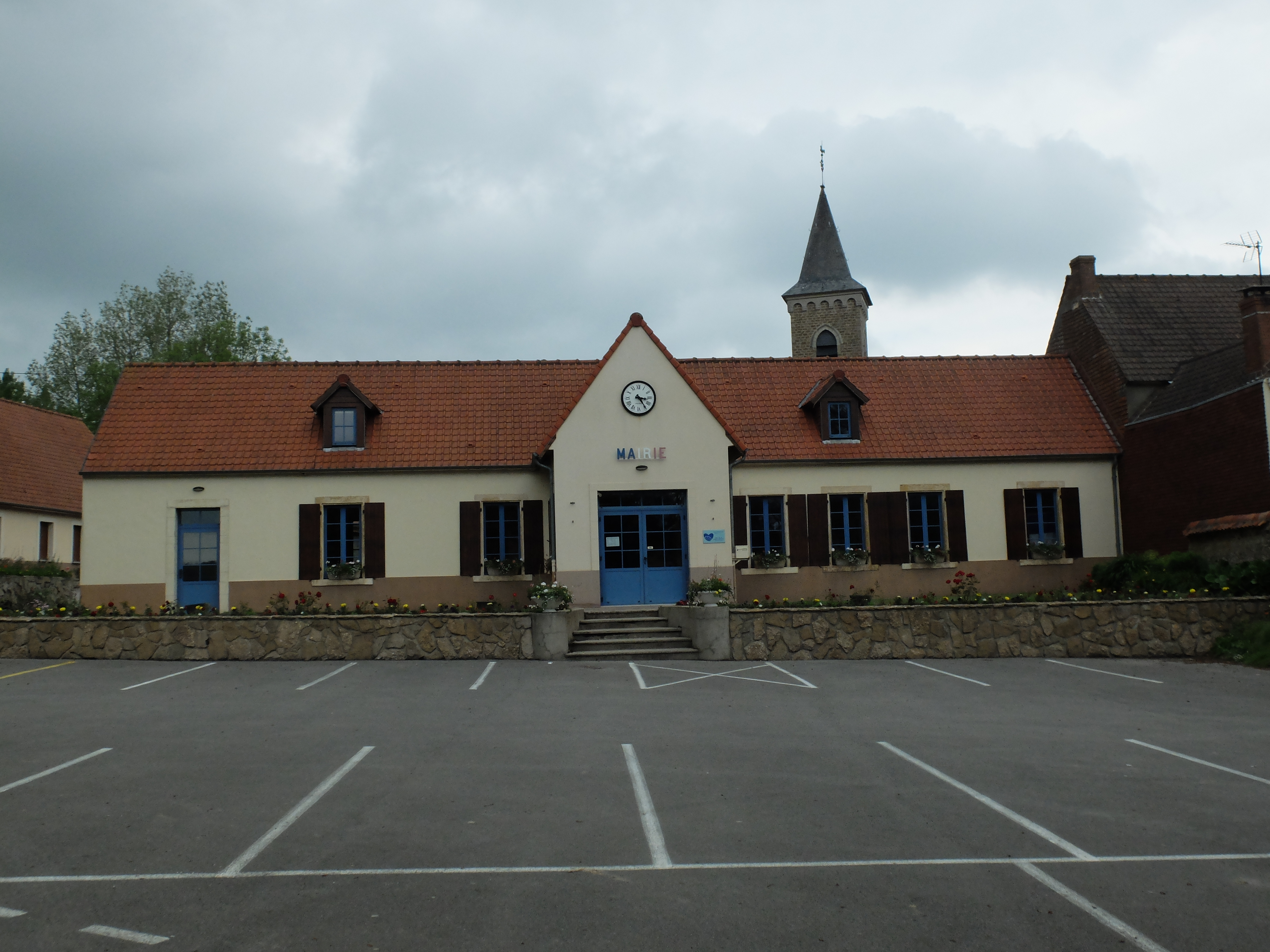 Vue de la mairie et d'un clocher d'église de Belle-et-Houllefort.